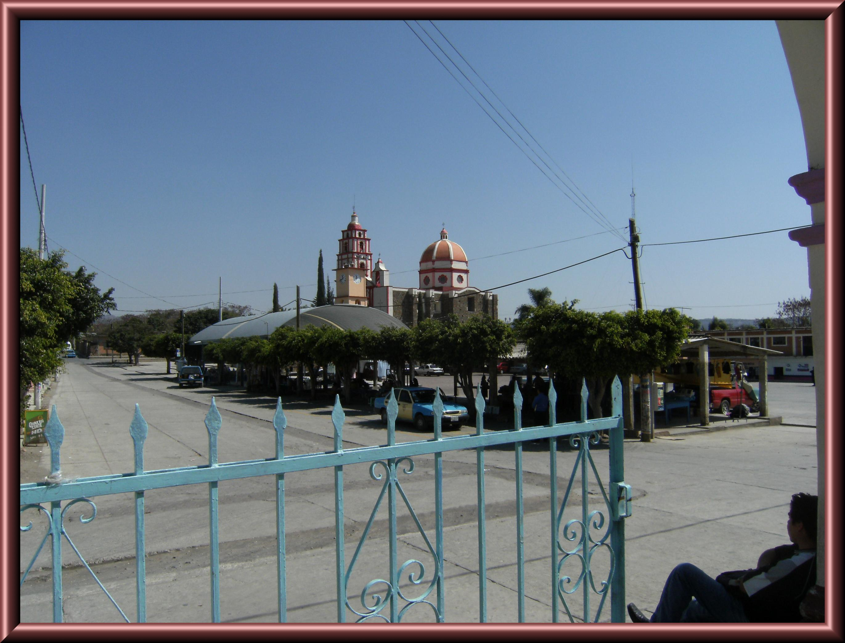 Iglesia de Jesús Nazareno en Cohuecan, Puebla .